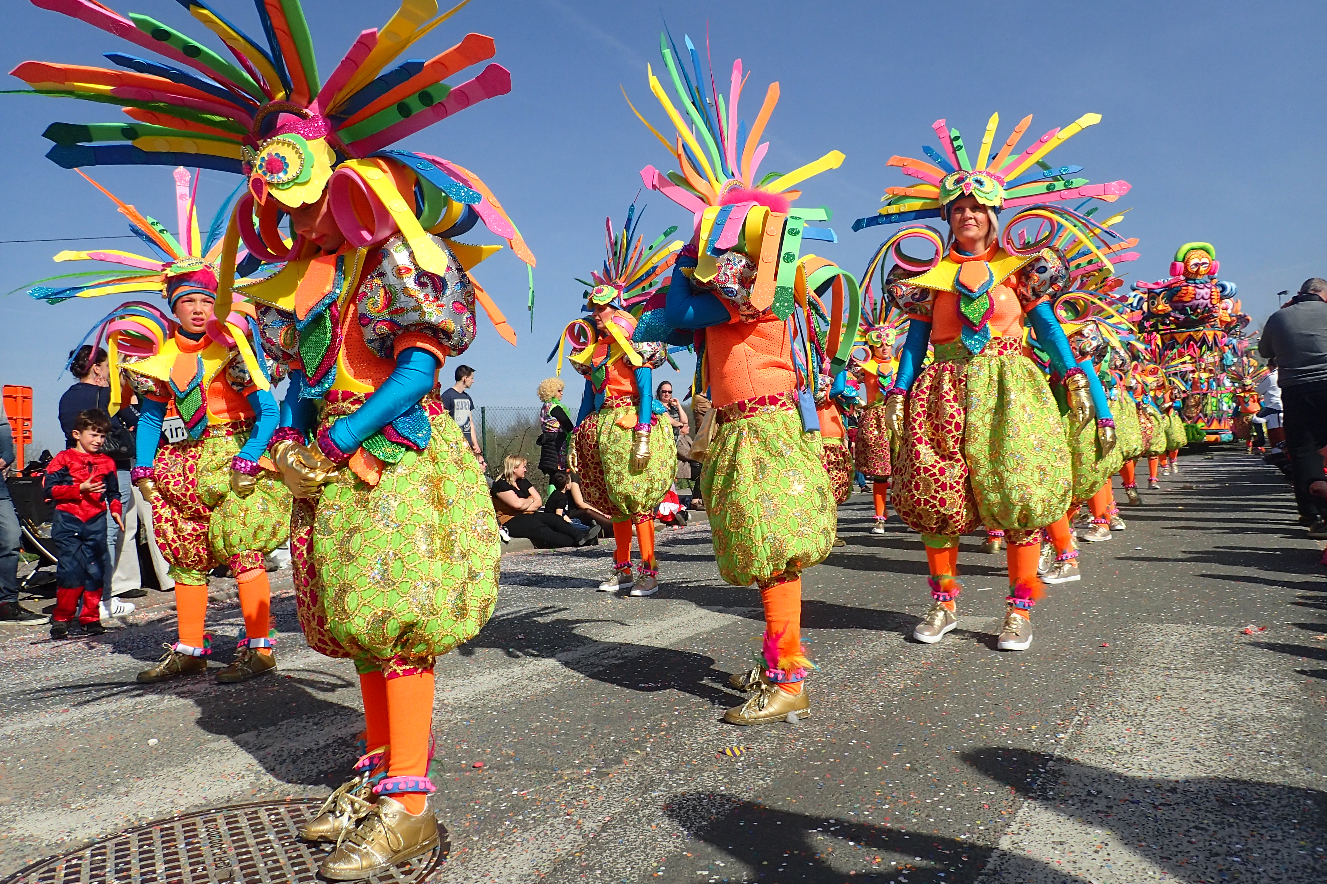 Carnavalsgroep met kleurige kostuums This photo of immaterial heritage has been taken in the Flemish Region